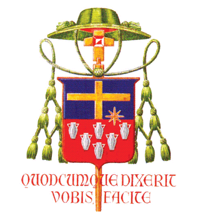 Brasão Episcopal de Dom Vicente Costa, Brasil